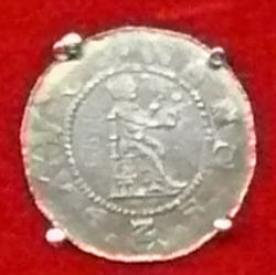 Denár Bořivoje II.